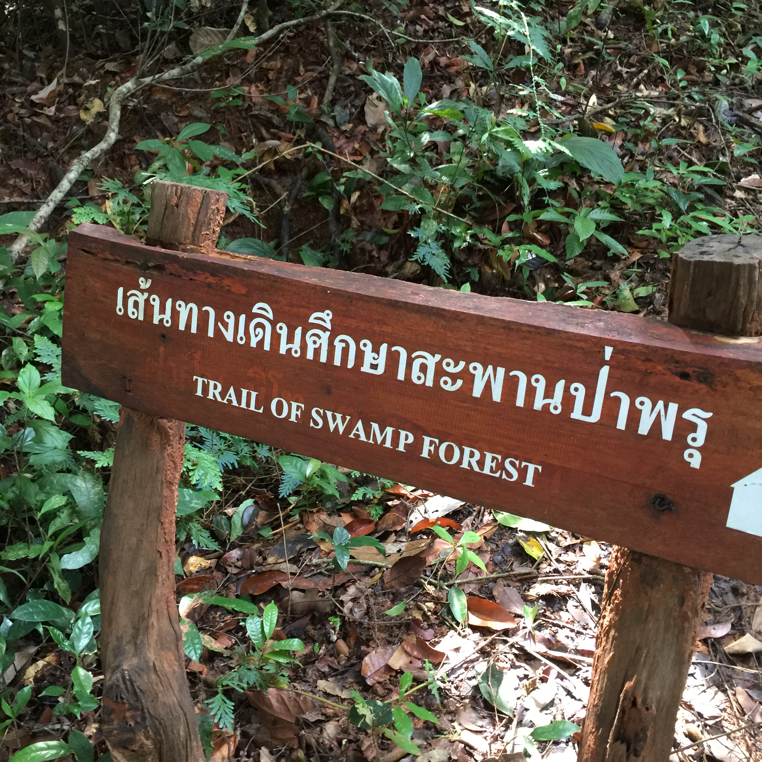 Thung Khai, Yan Ta Khao District, Trang 92140, Thailand